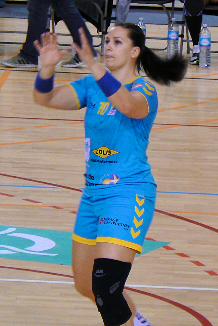 Sophie Herbrecht arrière gauche de l'équipe de Toulon St-Cyr Var lors du match face à Issy Paris Hand le 21 mars 2014.